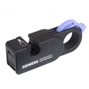 Šikovná pomůcka pro každého, kdo často montuje nebo předělává PROFIBUS konektory, repeatery apod.